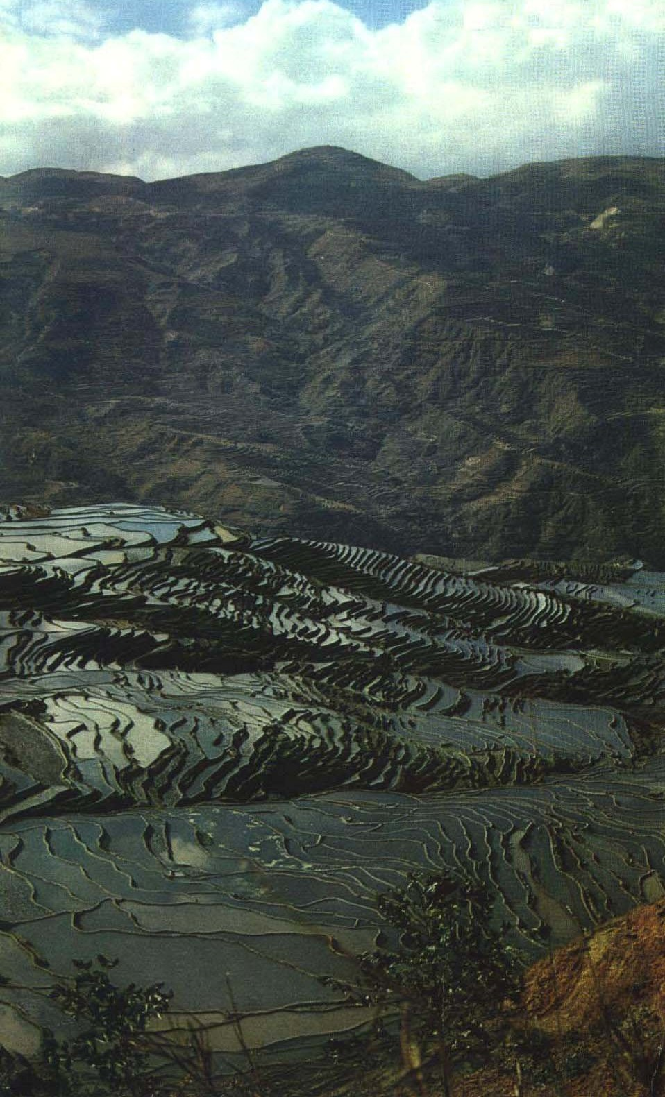 1964-09 1964年 哈尼族人在哀牢山开辟梯田